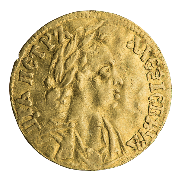 Червонец Петра I 1701 г. Аверс. Погрудный портрет царя, вправо; лавровый венок на голове без ленты. Бюст задрапирован плащом, скреплённым на плече застёжкой. Круговая надпись гласит: Ц[А]РЬ ПЕТРЪ АЛЕѮІЕВИЧЪ